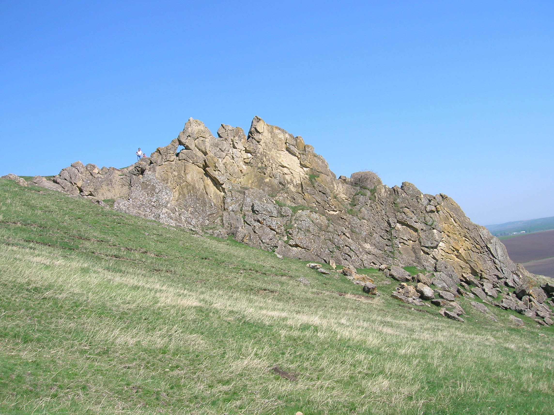 Stânca Şerbeşti, Comuna Ştefan cel Mare, Judeţul Neamţ - "Nasul" uriaşului